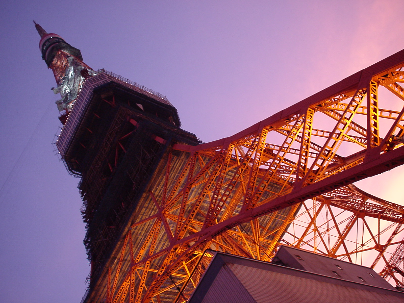 塗装作業中の東京タワー